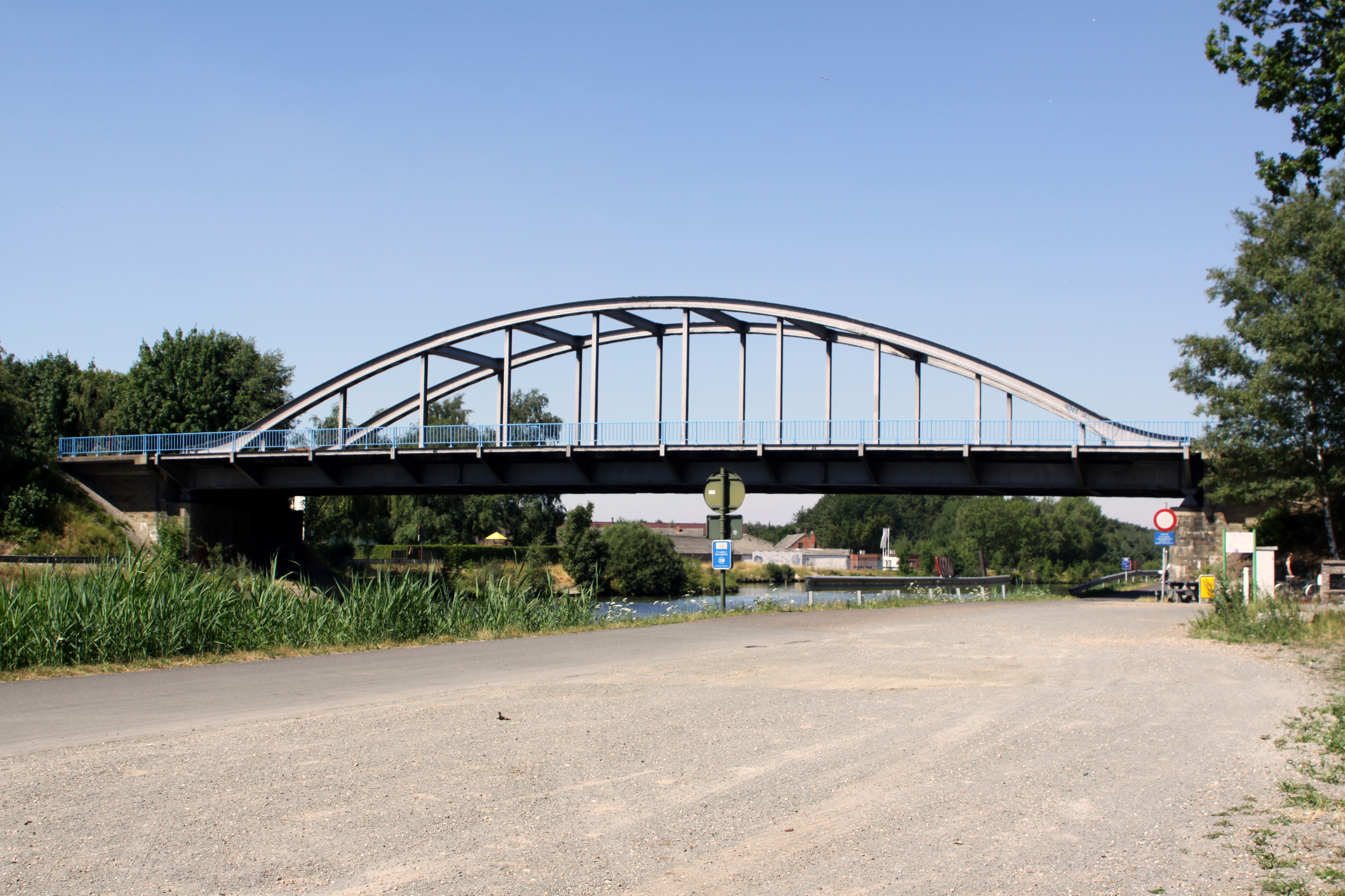 Joe's Bridge vum Kanal aus gesinn.